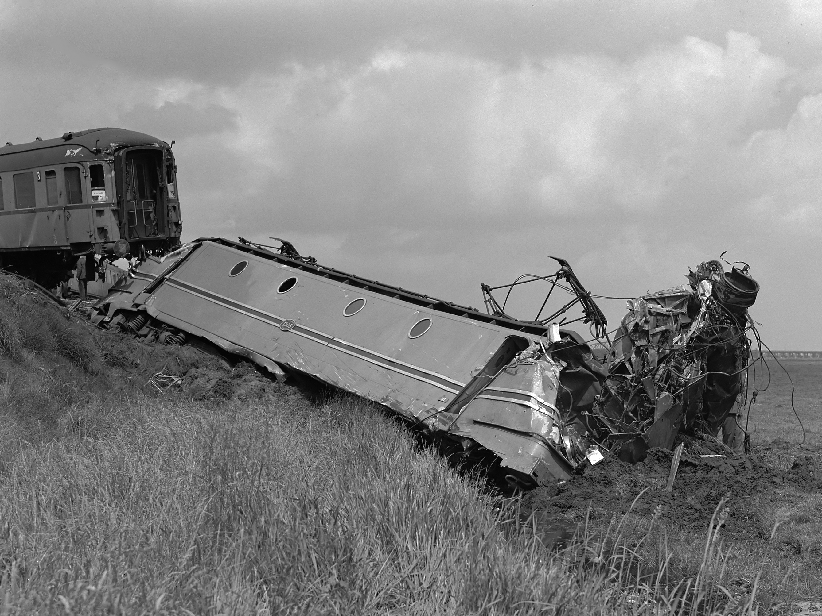 Spoorweg ongeluk bij Weesp. Expresstrein op forenzentrein Verongelukte locomotief 19 juni 1953